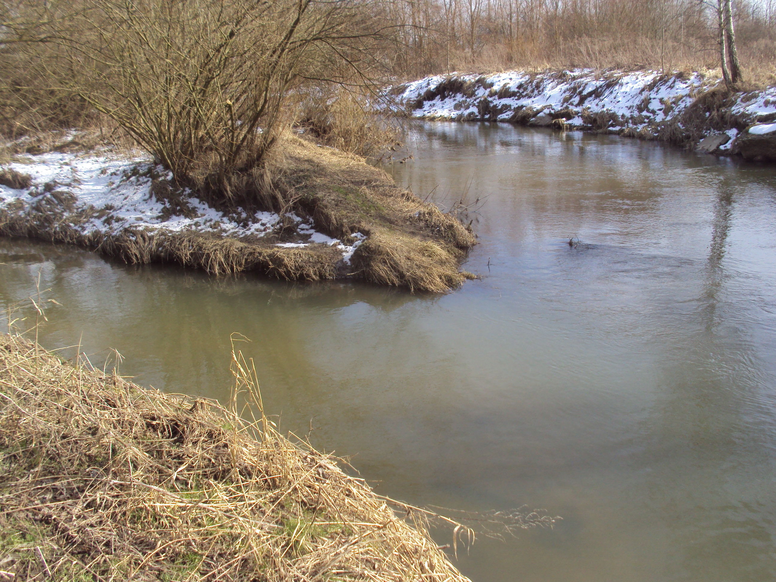 Soutok potoka Šporky a říčky Ploučnice u České Lípy